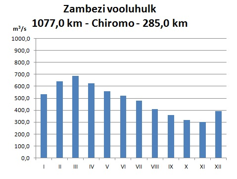 Zambezi hüdrograaf